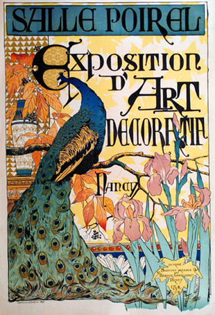 Ausstellungsplakat der L'Exposition d'art décoratif der Galeries Poirel in Nancy im Jahr 1894, Entwurf Camille Martin (1861 - 1898)